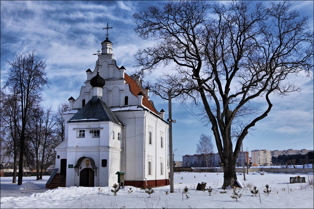 Траецкая царква. Орша